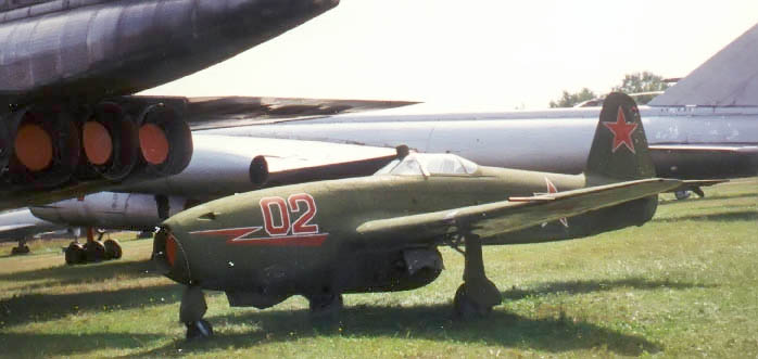 Soviet fighter Yakovlev Yak-17